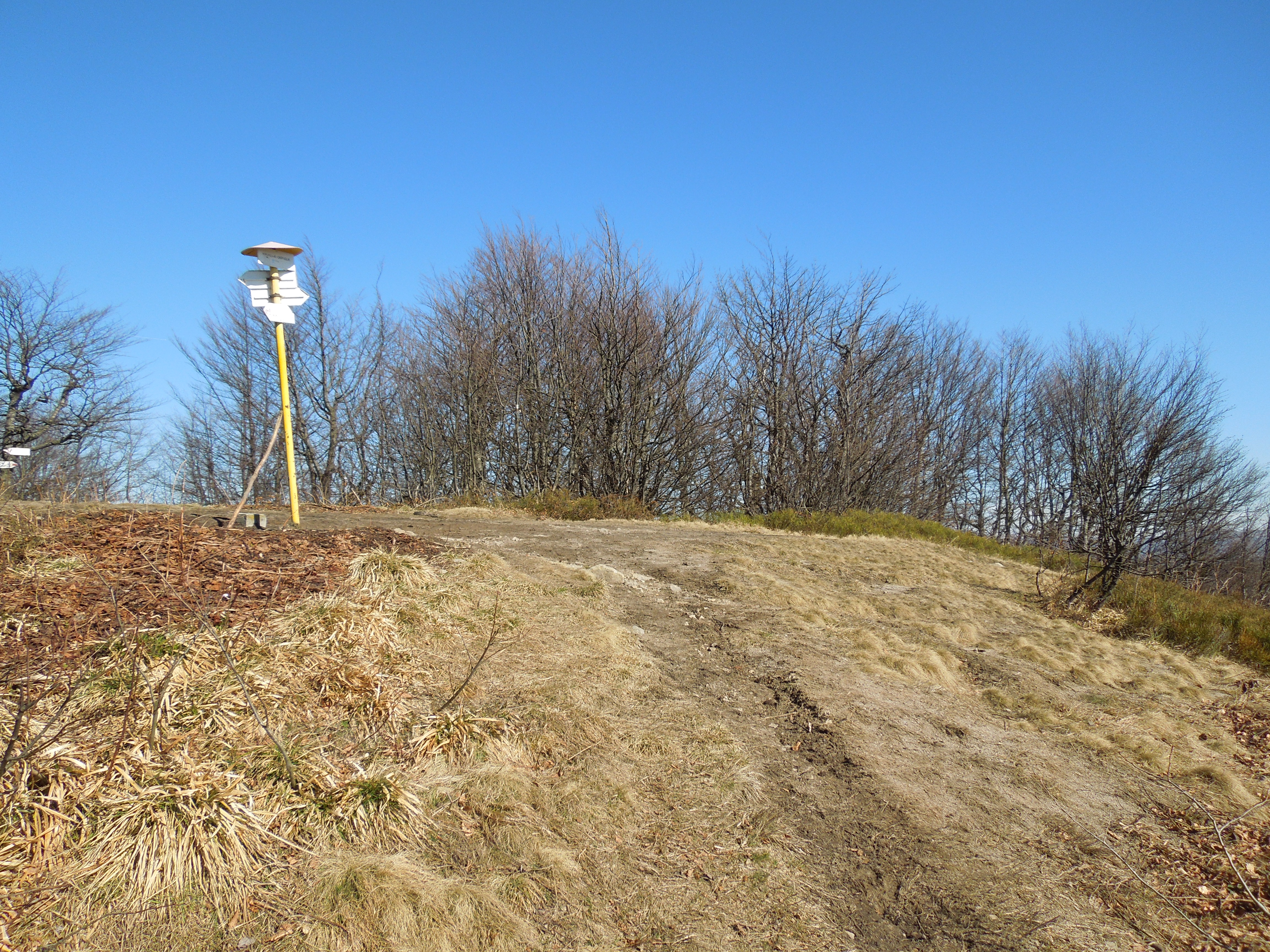 Vrchol Kruhliaka v marci